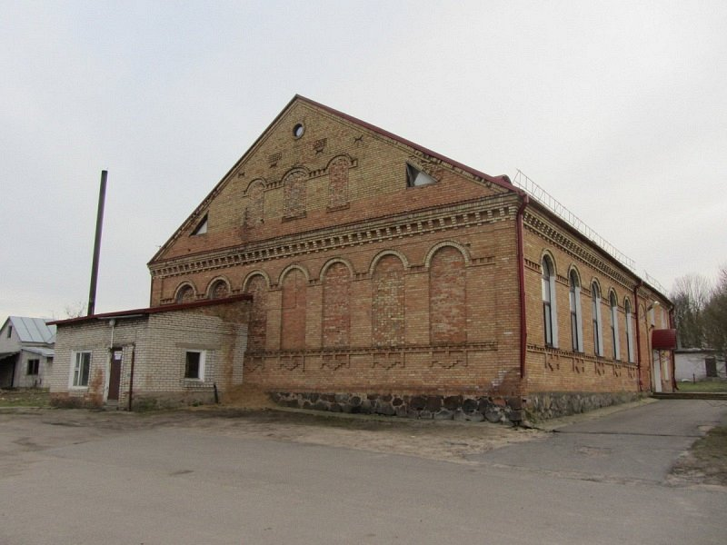 Радунь. Ешыва